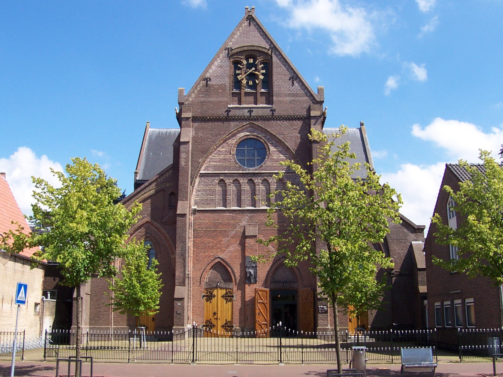 Sneek, St. MartinuskircheFrysk: Snits, Sint-Martinustsjerke